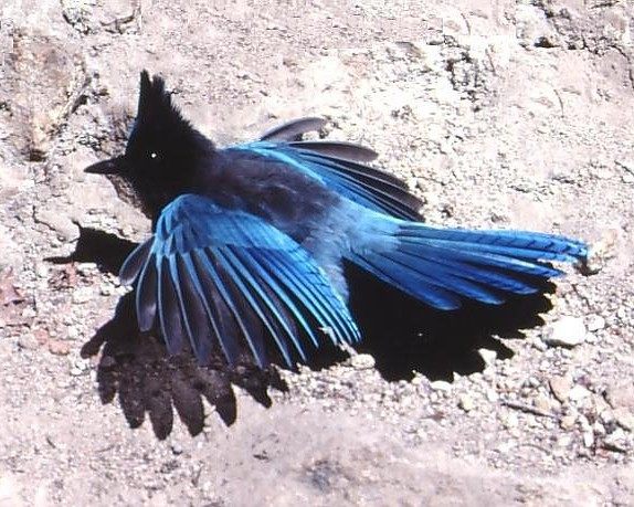 Stellers Jay (Cyanocitta stelleri stelleri), Yosemite National Park, USA